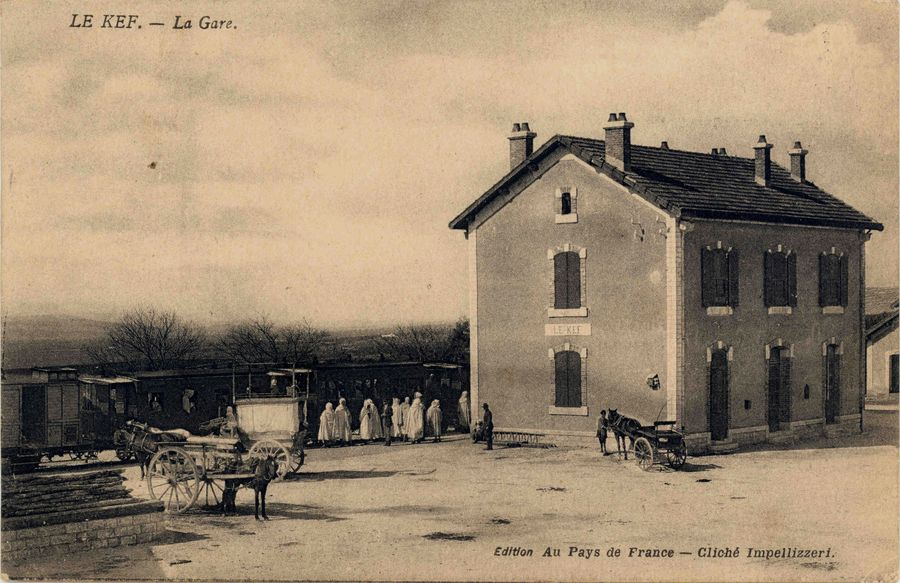 Gare du Kef